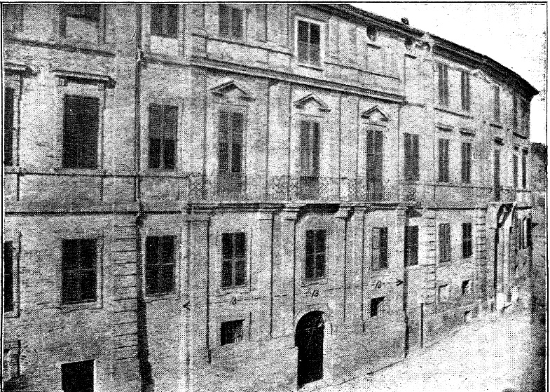 A picture from File:Zibaldone di pensieri III.djvu